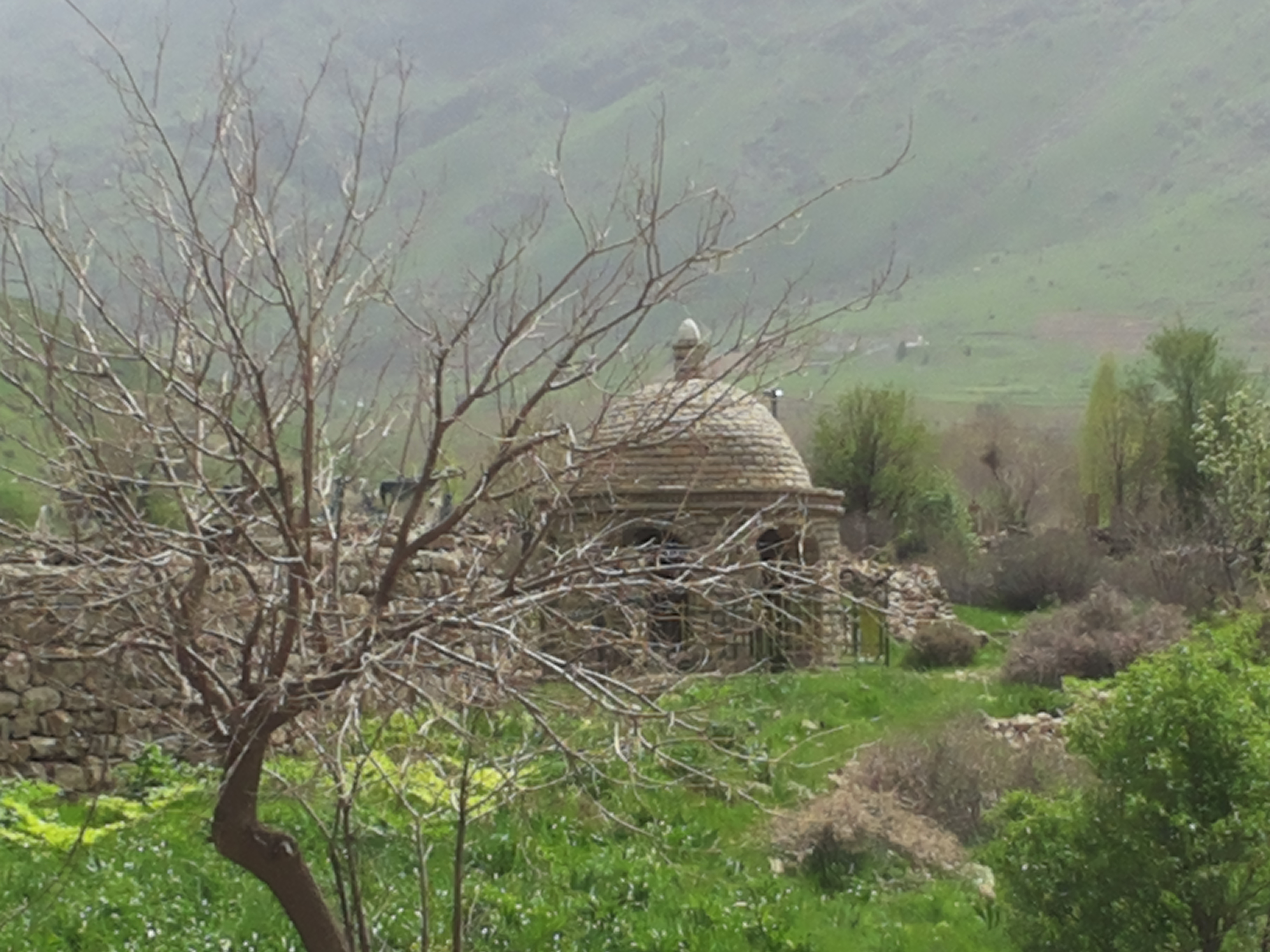 کوردی: مەزاری مەلا حەسەن دزڵی